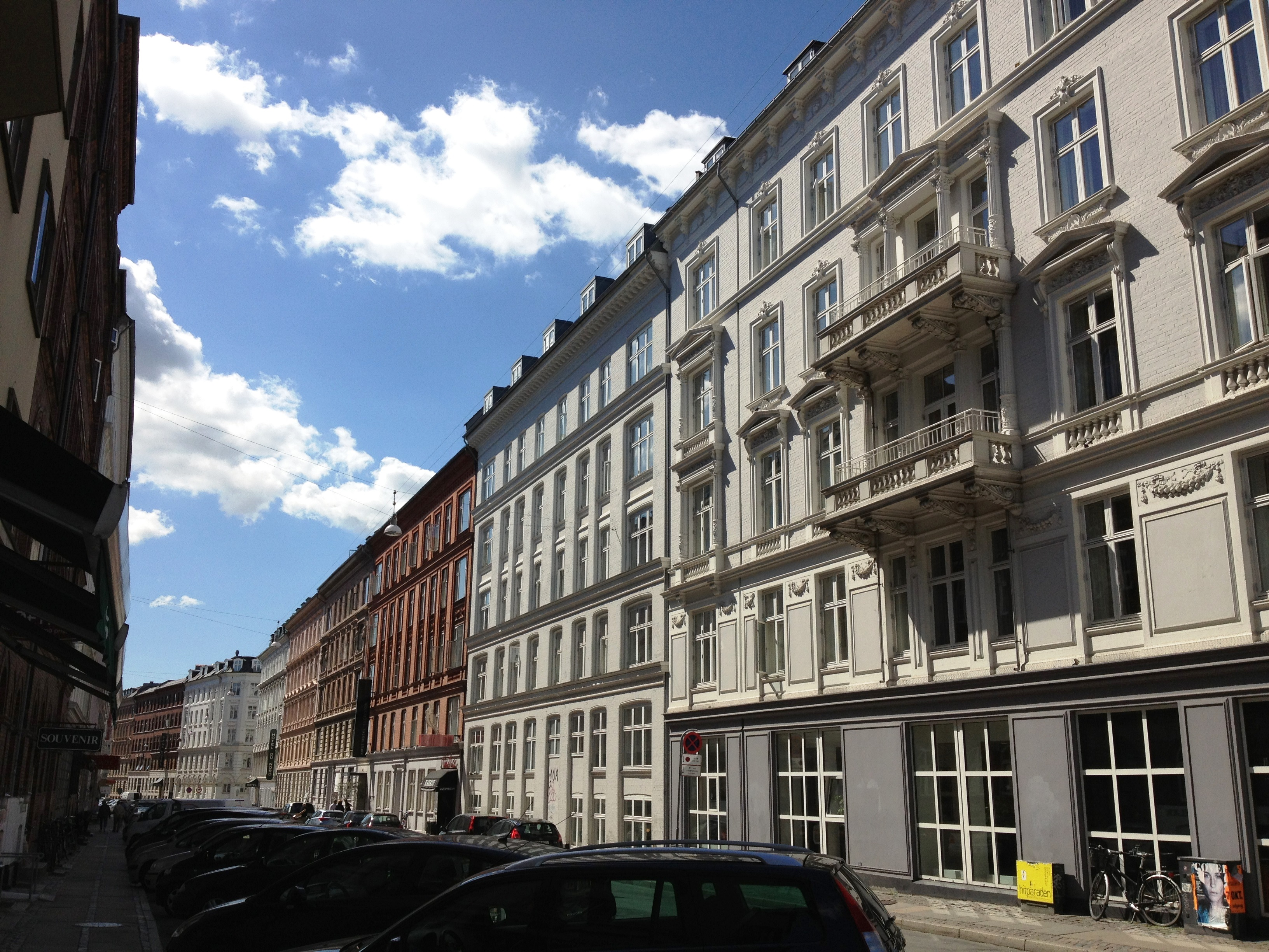 Colbjørnsensgade seen from Vesterbrogade in Copenhagen, Denmark